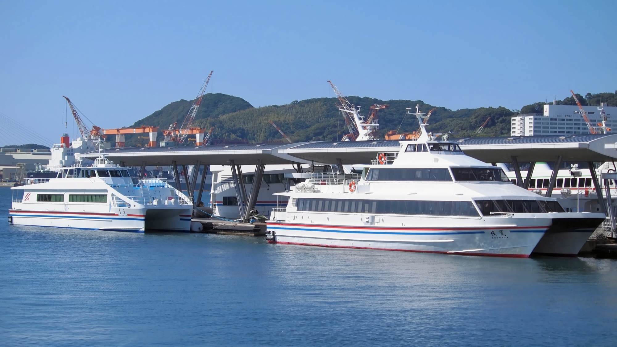 野母商船グループ・長崎汽船の高速船「鷹巢」（左）と「俊寛（旧名：コバルトクイーン2号）」。